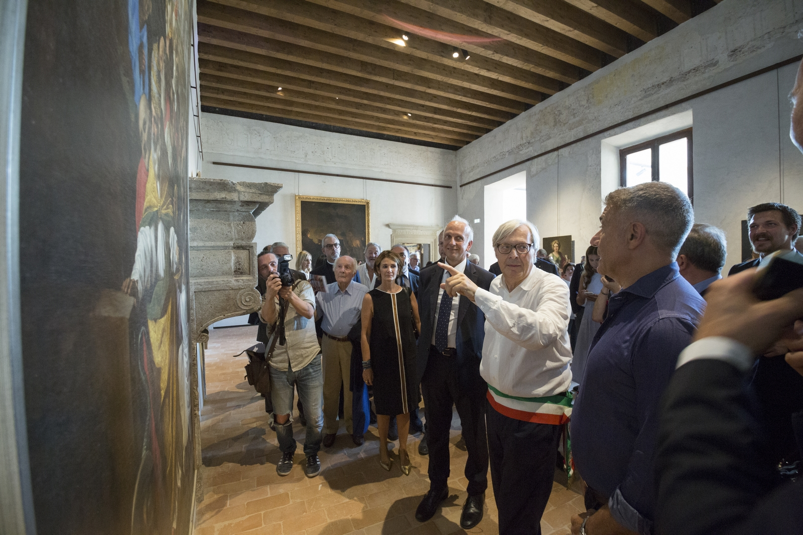 Vittorio Sgarbi, nel corso dell'inaugurazione del museo di Palazzo Doebbing, illustra un'opera d'arte sacra al ministro dell'Istruzione, Marco Bussetti, e all'ex ministro Alfonso Pecoraro Scanio